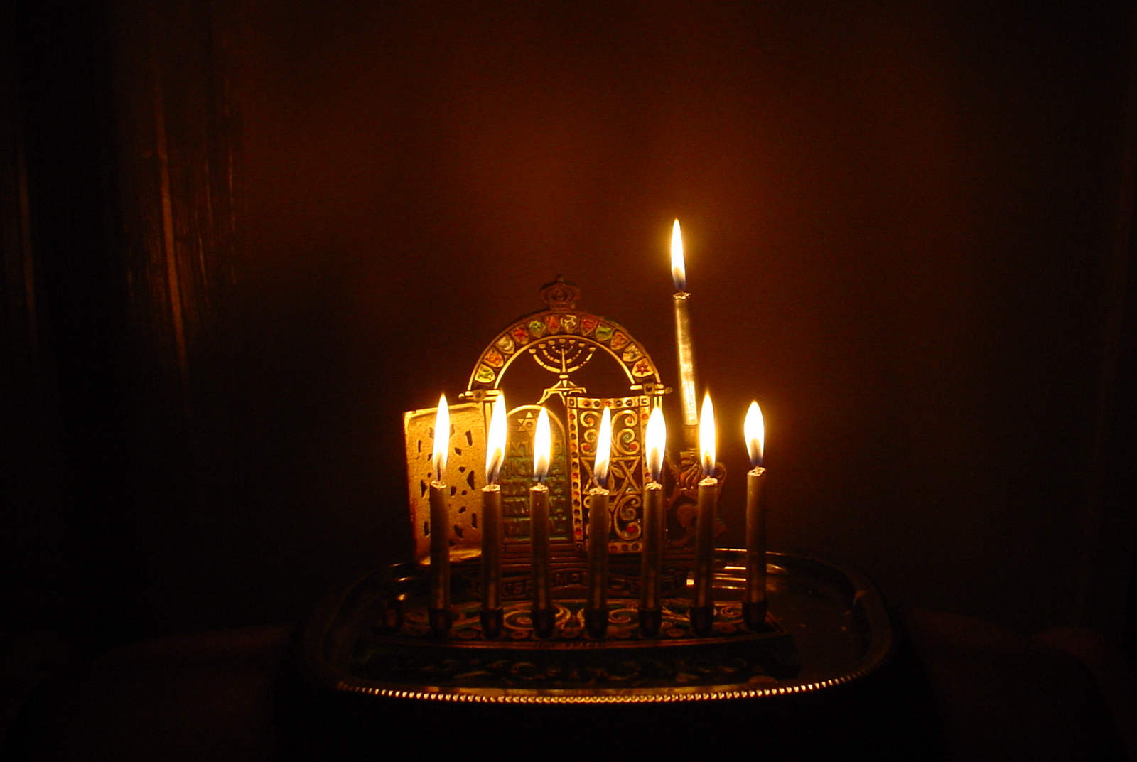 Candelabro de Januca prendido el 7º día